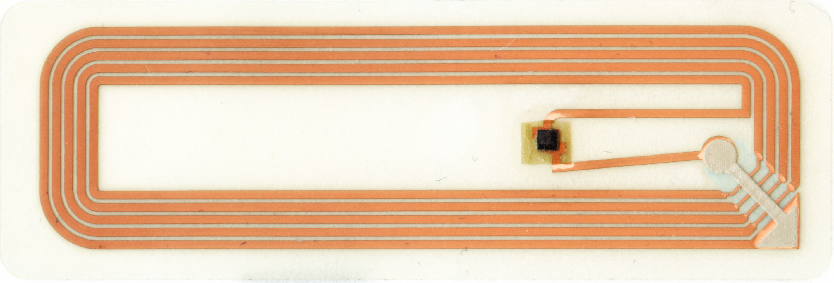 13,56 MHz Smartlabel direkt eingescannt